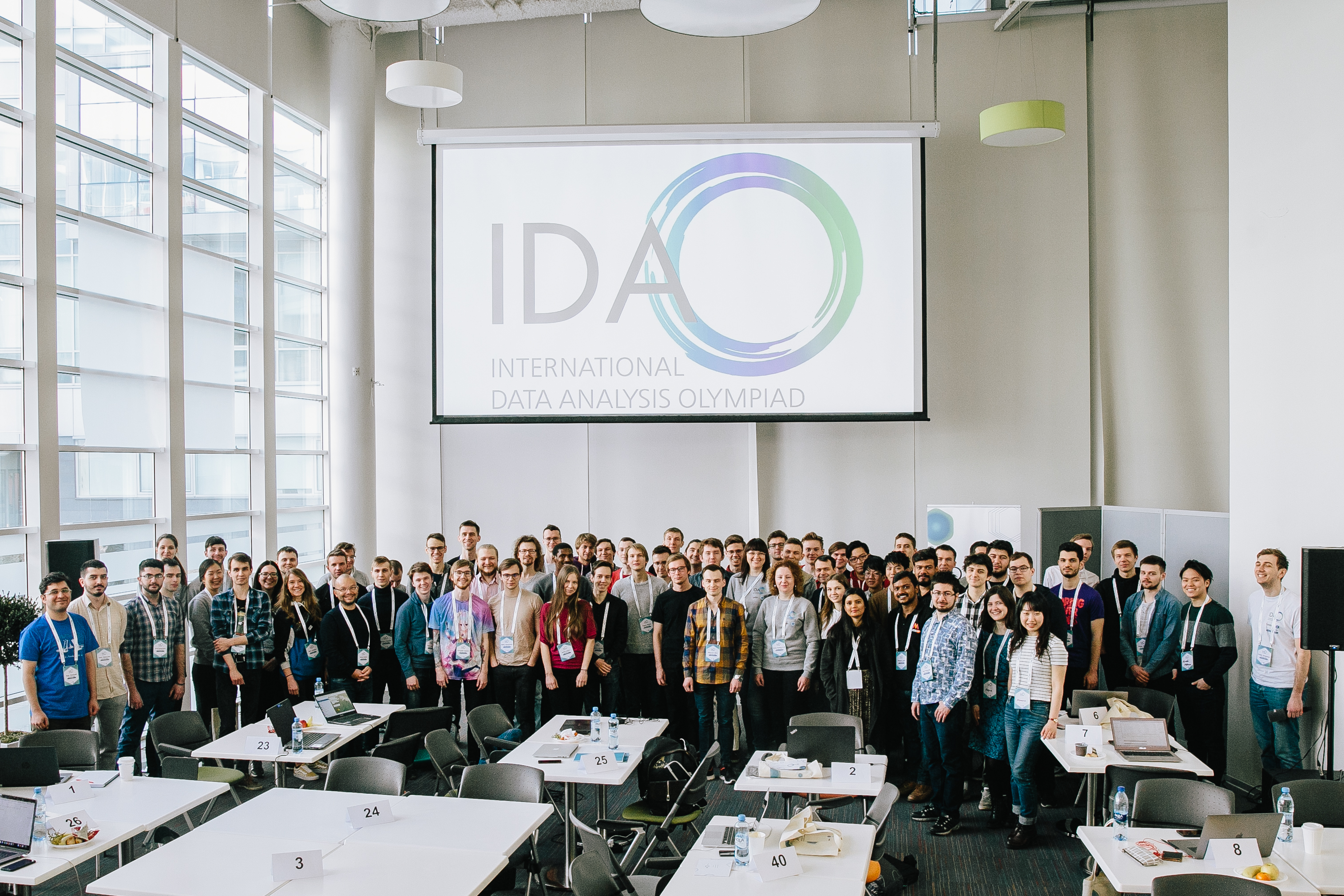 Вторая Международная олимпиада по анализу данных 2019